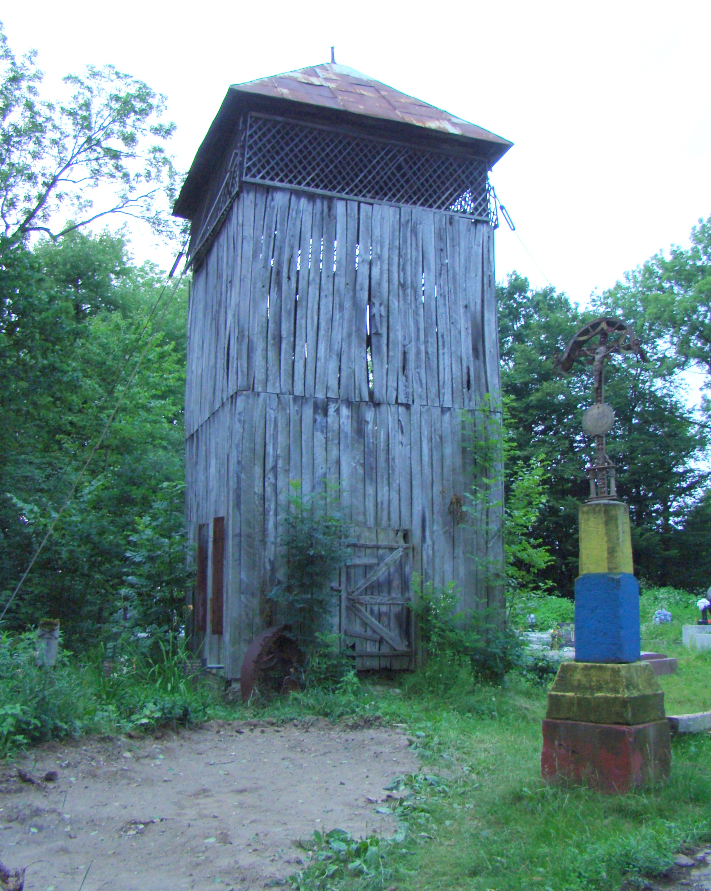 Biserica de lemn din Coruia 02